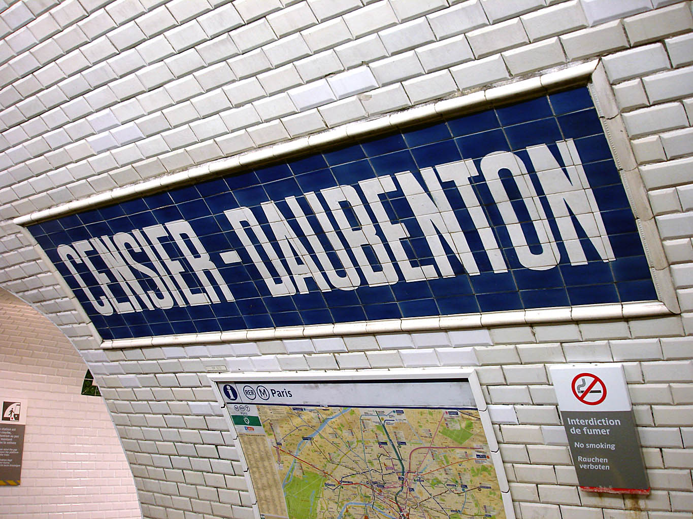 Station Censier - Daubenton de la ligne 7 du métro de Paris, France.